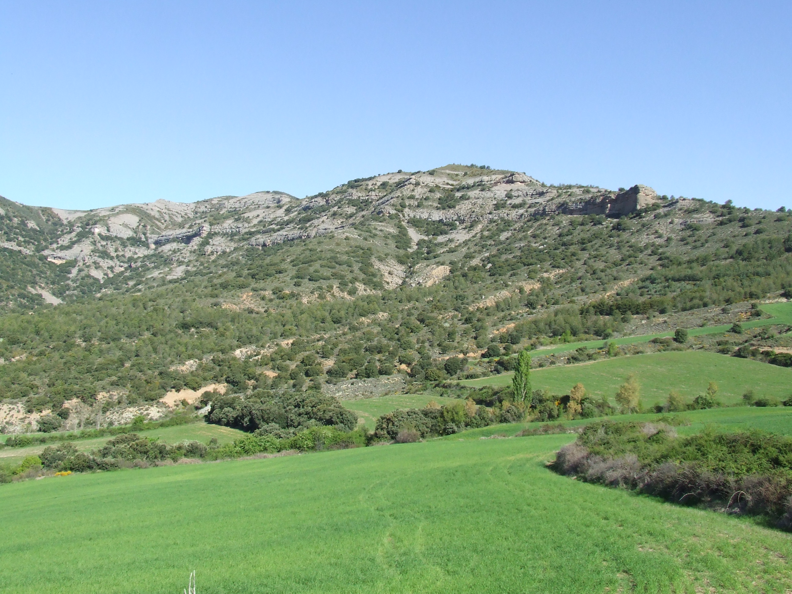 La Serra Mitjana, o de Montibarri (Gurp de la Conca, Tremp, Pallars Jussà)